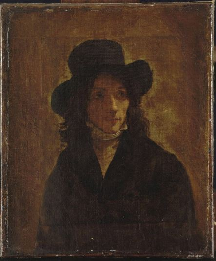 Jacques François Joseph Swebach-Desfontaines (1769-1823), peintre de batailles